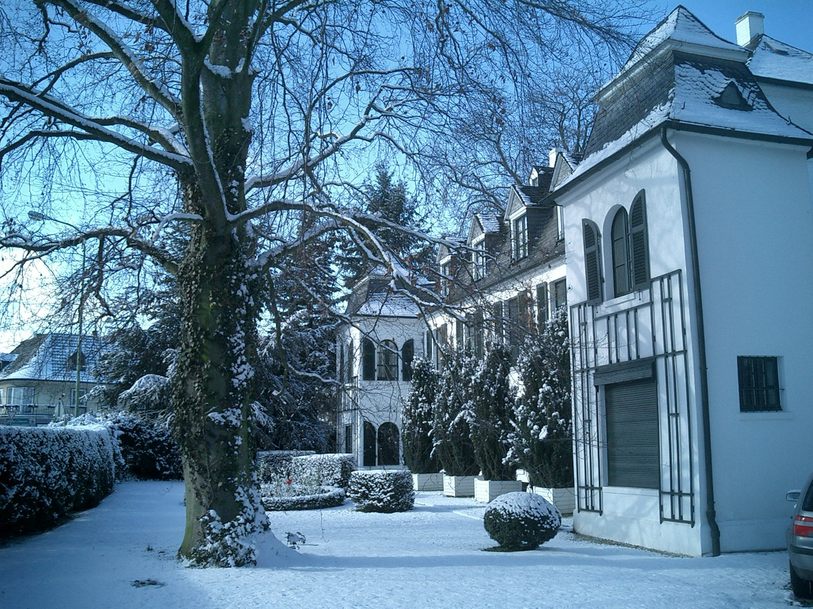 Das Bild zeigt Haus Spitz in Zülpich